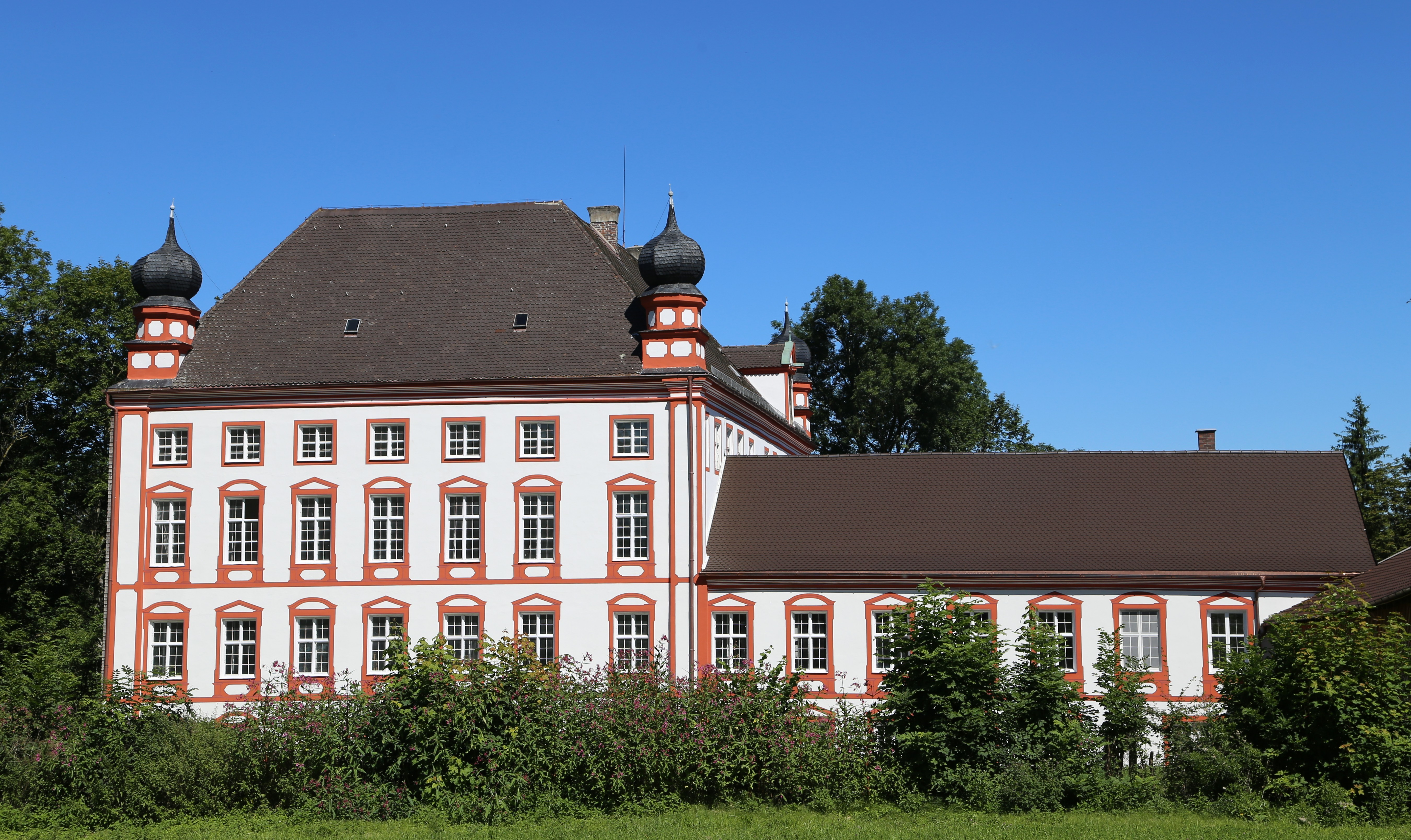 Schloßstraße 21, Höhenrain, Feldkirchen-Westerham; Schloss Höhenrain, Hauptbau drei- und viergeschossig, mit Steilwalmdach und Erkertürmen mit Zwiebeldächern, im Kern 1545, um 1725 und um 1760 barocke Ausbauten; mit Ausstattung. Östlich angeschlossene Nebengebäude: Gasthaus, Torhalle, ehemaliger Brauereisaal, ehemalige Remise, sämtlich 2. Hälfte 19. bis Anfang 20. Jahrhundert